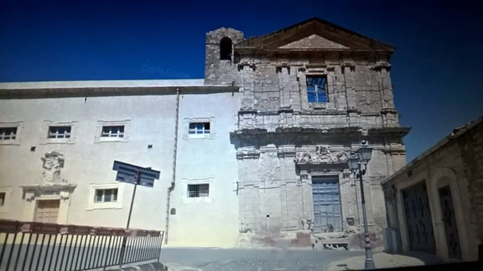 chiesa santi Filippo e Giacomo